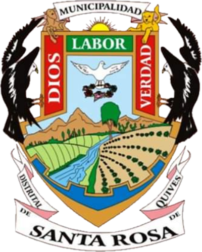 Escudo distrital de Santa Rosa de Quives, Provincia de Canta, Región Lima